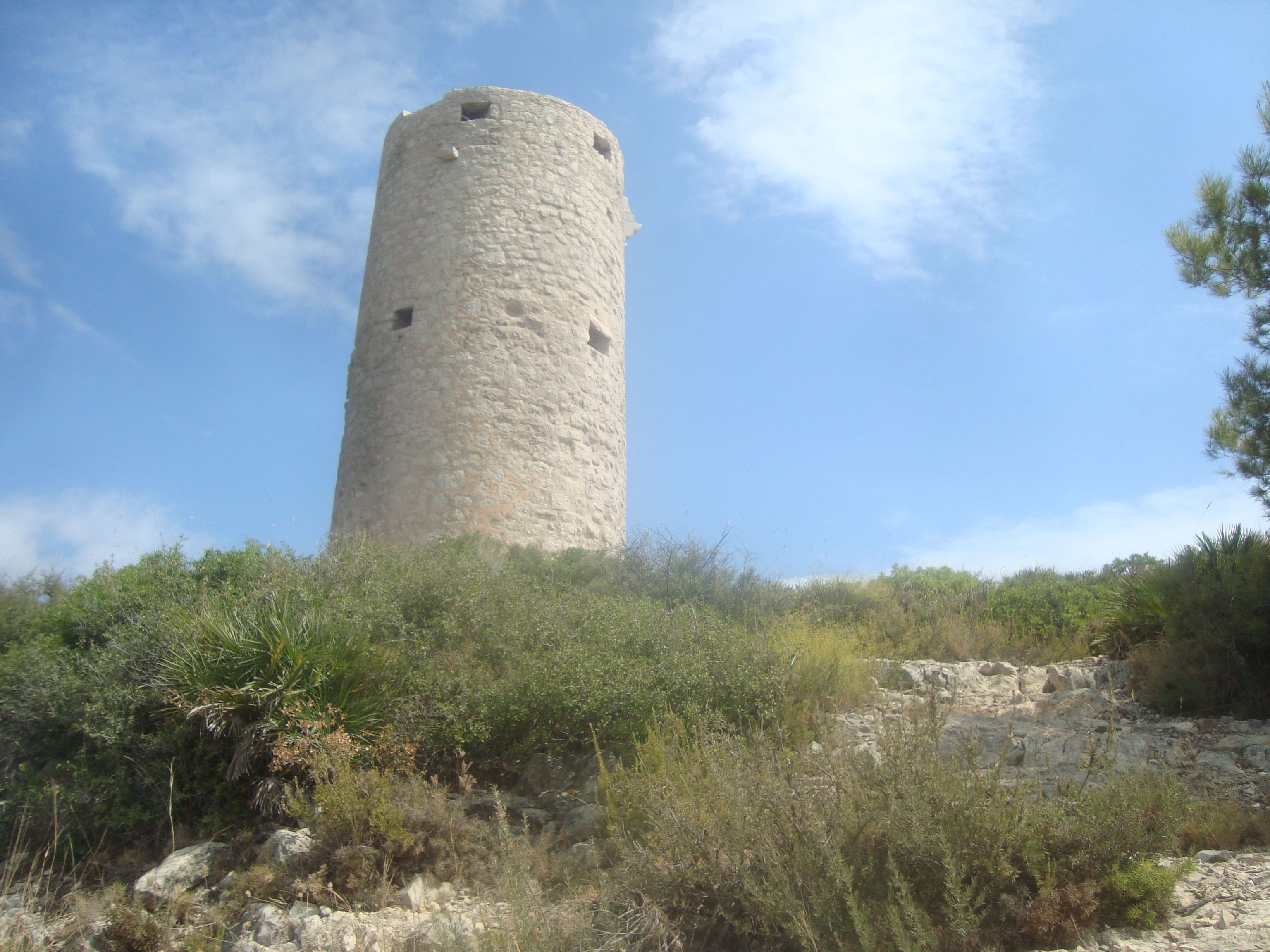 Torre Badum Torre Almadum y La Torra . Torre Badum, perteneciente a la línea de torres vigía de la costa del Reino de Valencia.